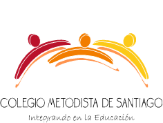 Logo del Colegio Metodista de Santiago, Iglesia Metodista de Chile